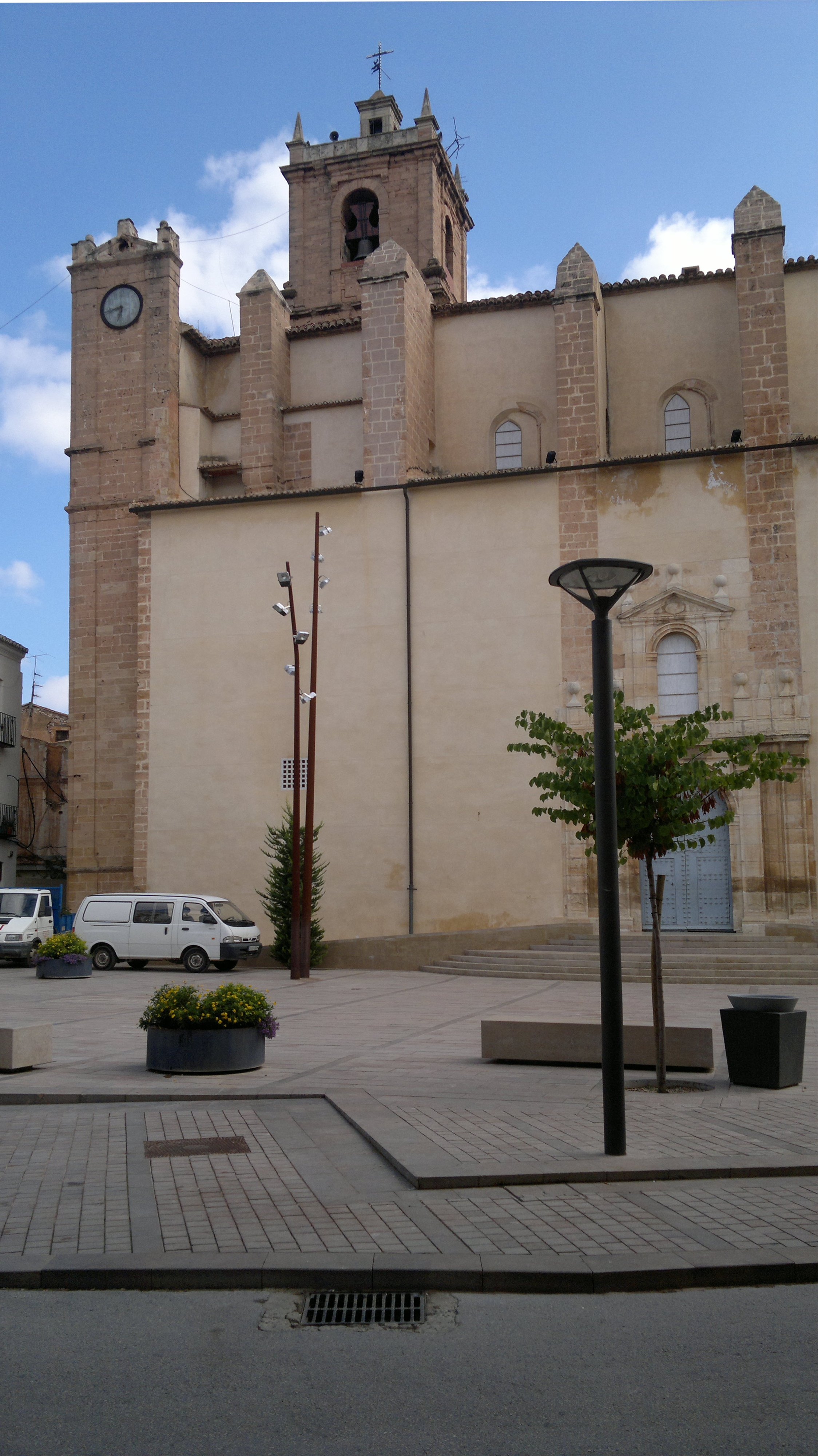 Imagen tomada desde la puerta principal, en la Plaza de la Iglesia de Utiel